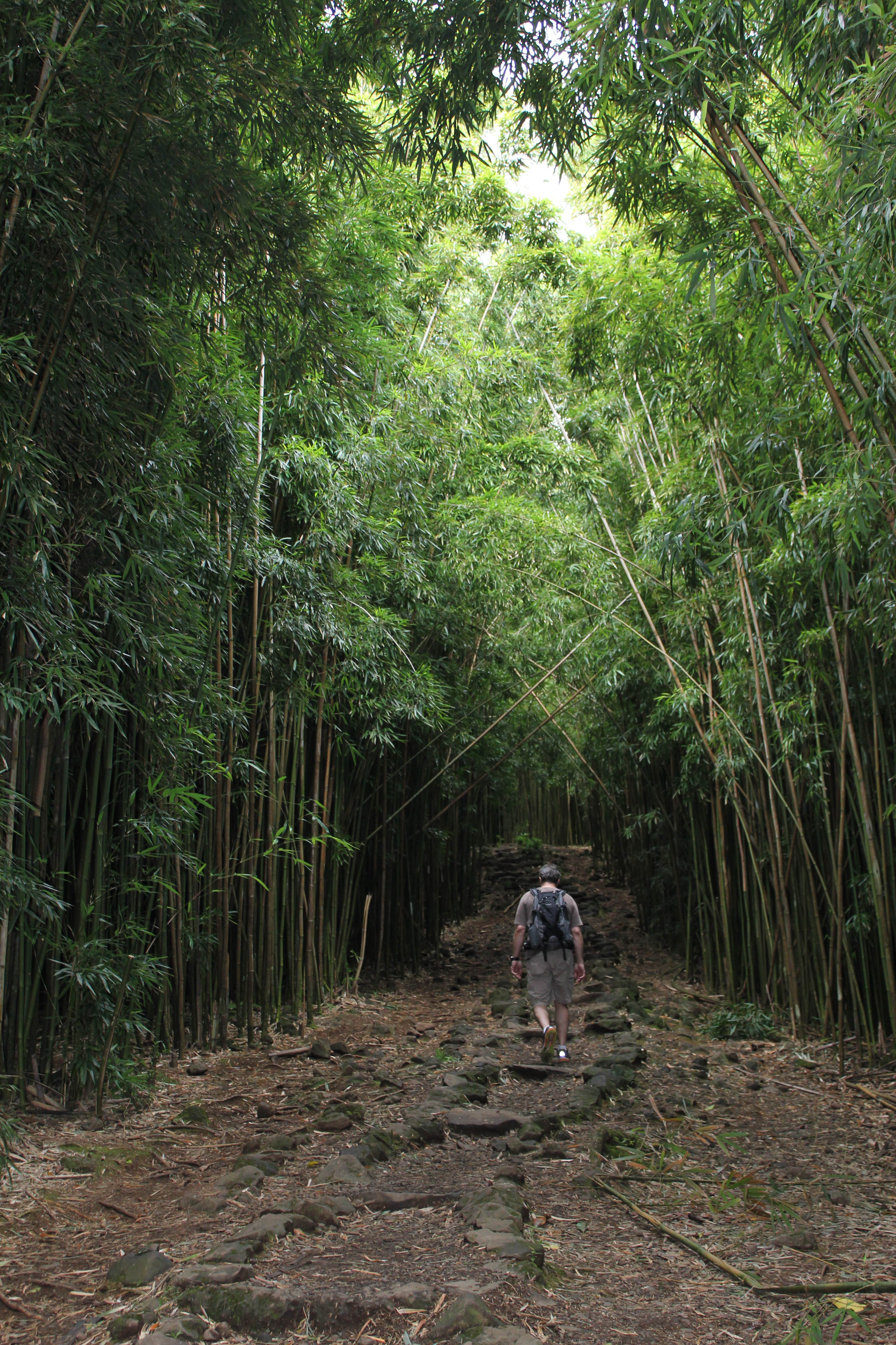 Haleakala NP Kipahulu District (coastal area)